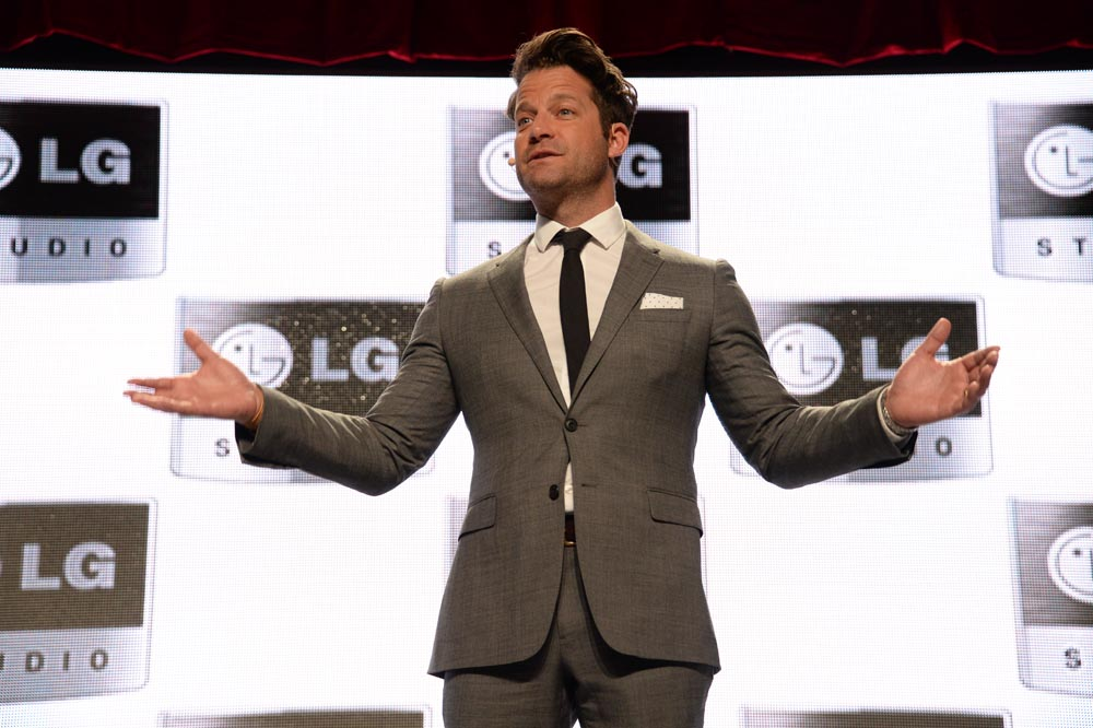 미국 라스베이거스에서 열린 CES 2014 Press Conference 현장 사진. ※ Social LG전자 에서 관련 보도자료를 확인하실 수 있습니다.